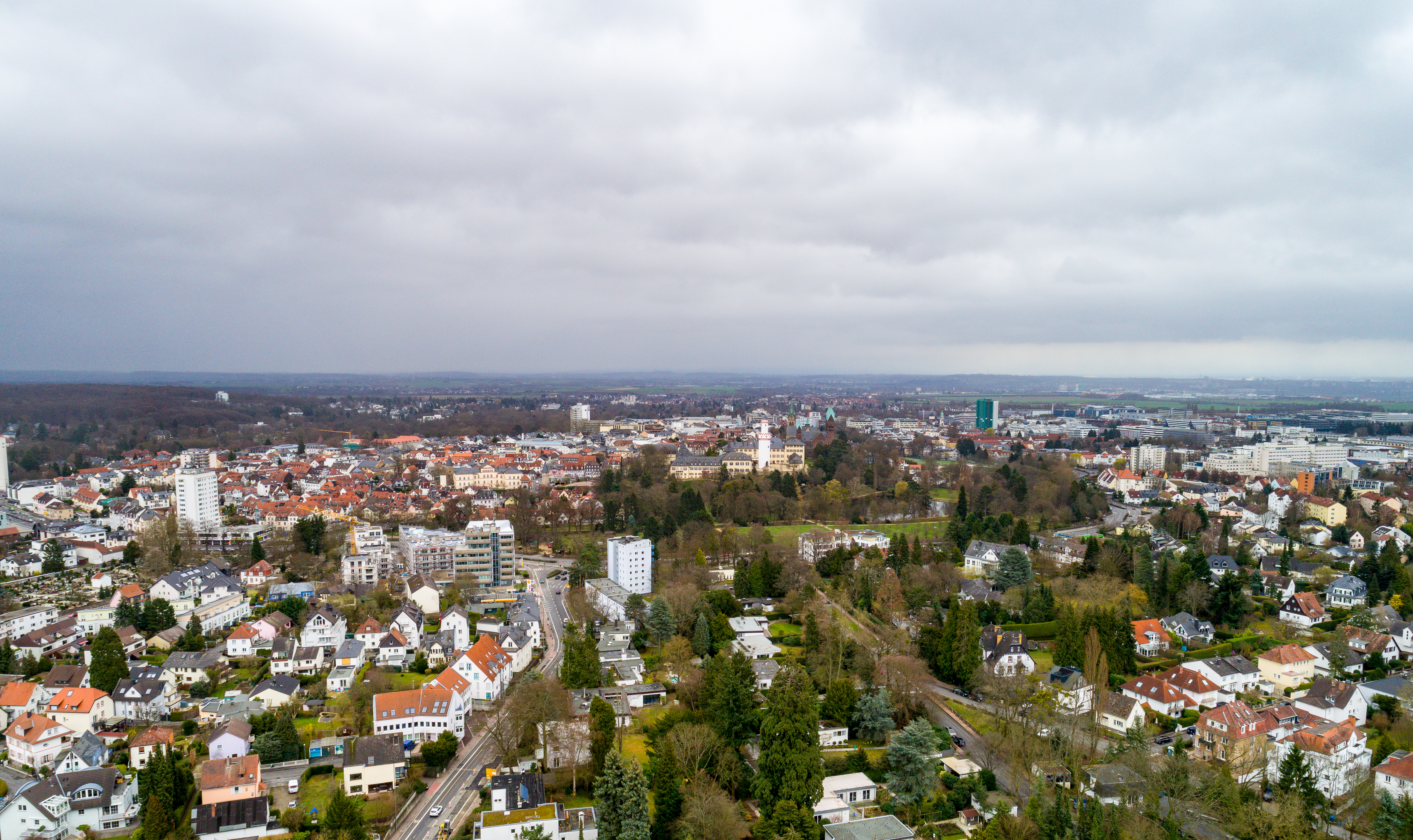 Bad Homburg, Stadtmitte West mit Untertor und Schloßpark, im Vordergrund der östliche Teil des Adelheidswertparks und der Anfang der Tannenwaldallee. Rechts das ehemalige Kreiskrankenhaus und ein Teil der Berliner Siedlung